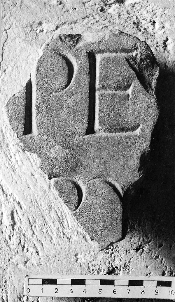 Уламок напису з бази скульптури Кальпета Сільвія на Форумі Августа